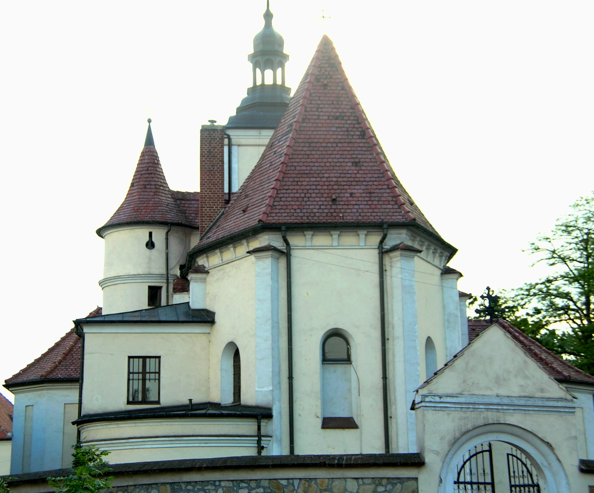 Church (XVI c.) in Kujawy (Opole Silesia)